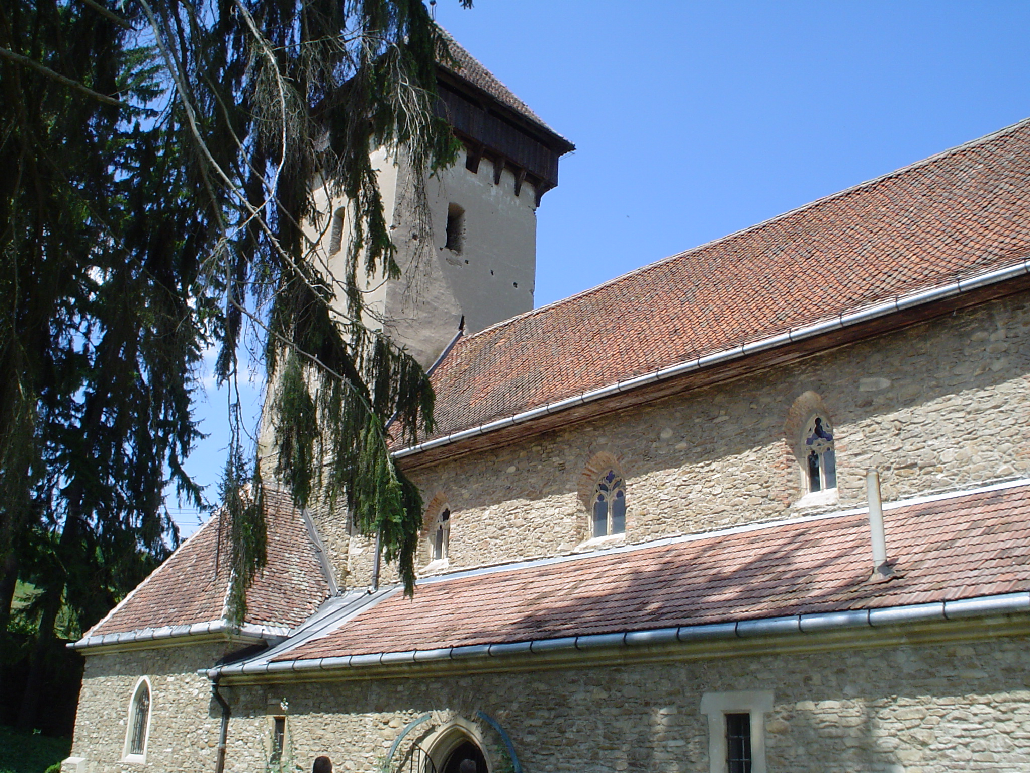 2007-07-14 Mălâncrav, Transylvania, Romania: Saxon fortified church.